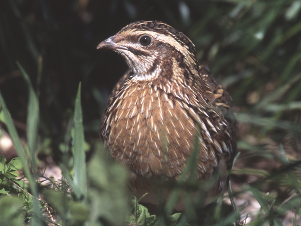 Coturnix coturnix